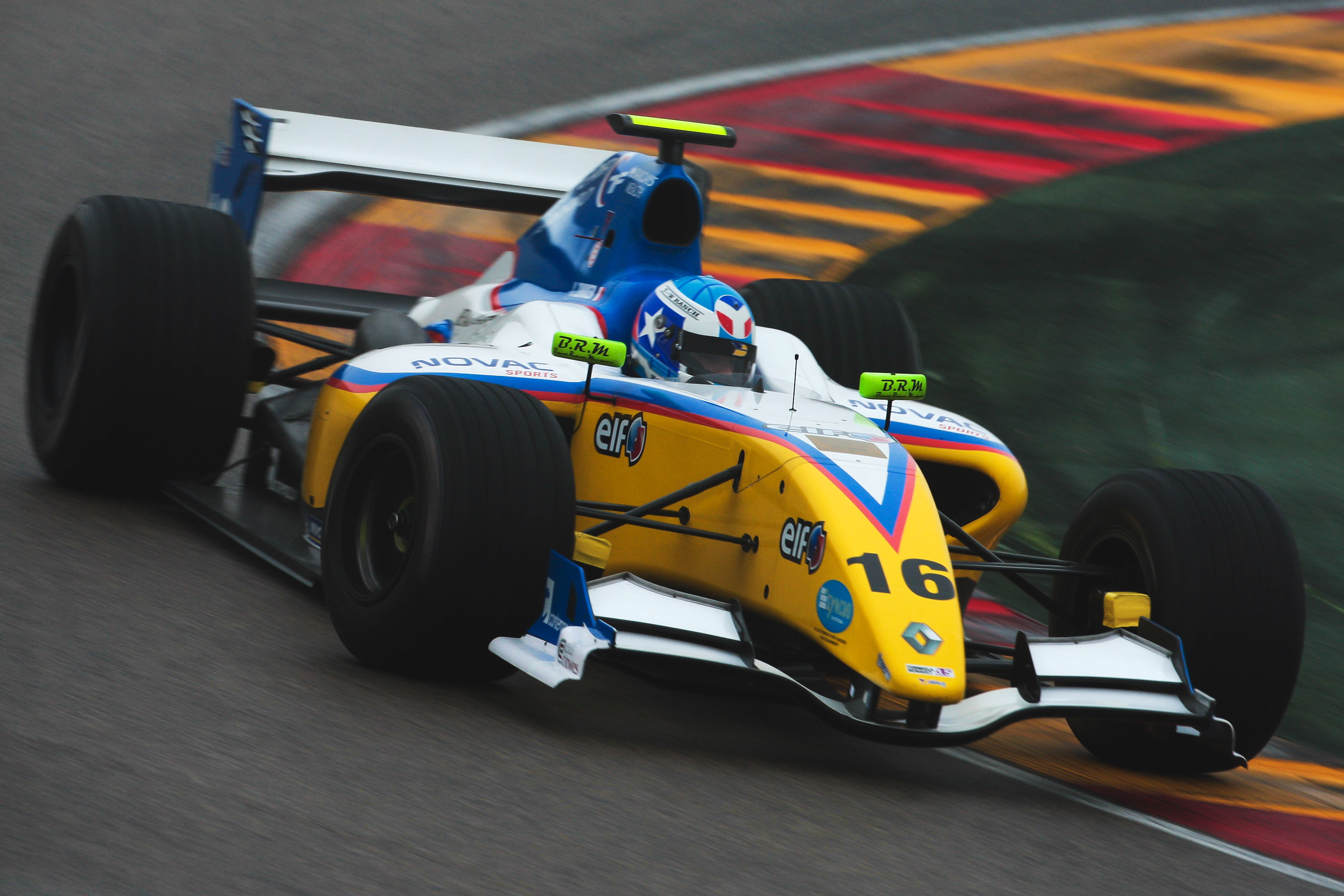 Test de Yann Zimmer avec Draco Racing à Motorland